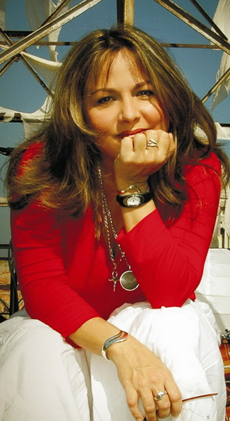 Fotografía del DVD Anatomía de La Habana